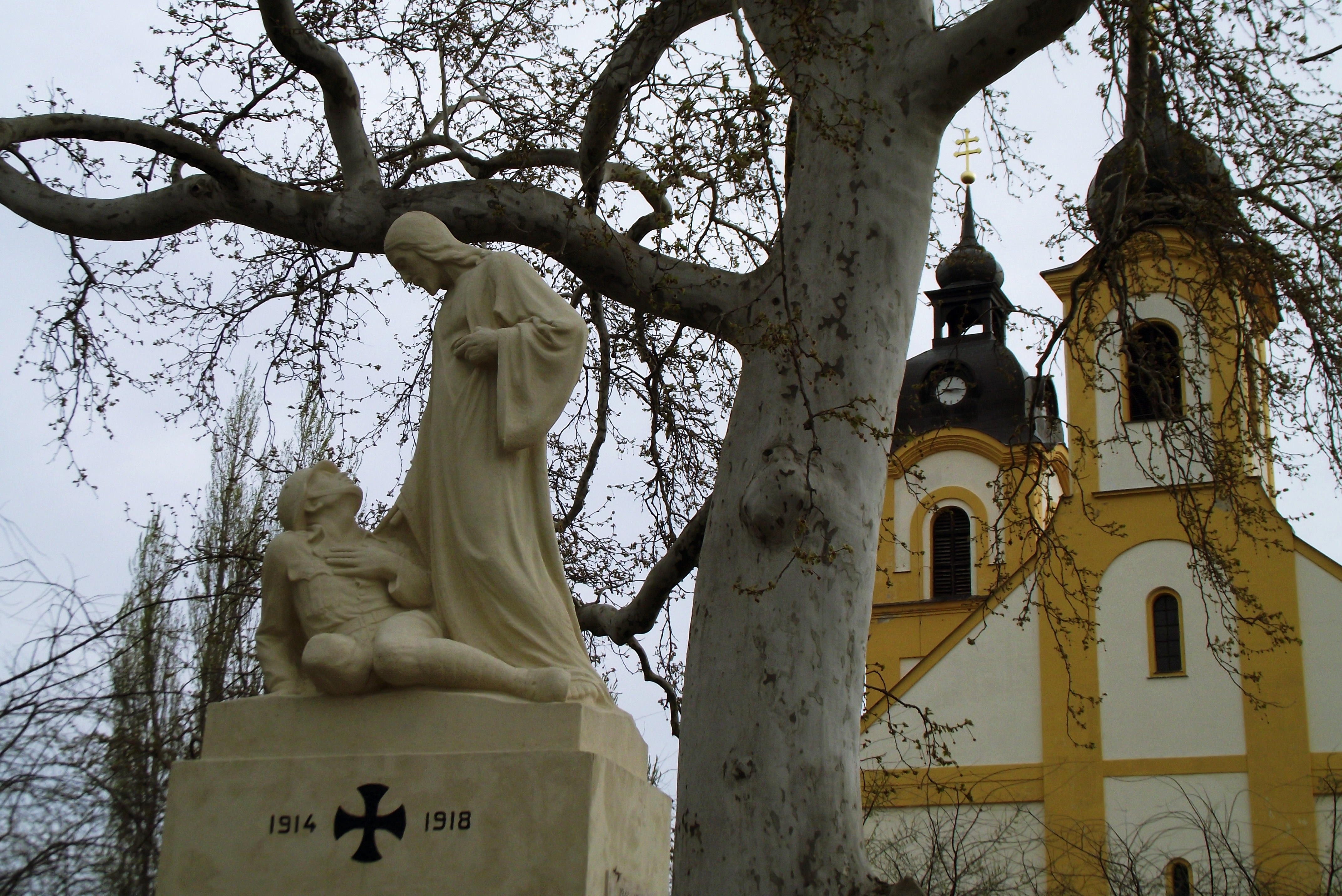 Rábapordány hősi halottainak emlékműve háttérben a Szent András apostol templommal 2015 tavasz.